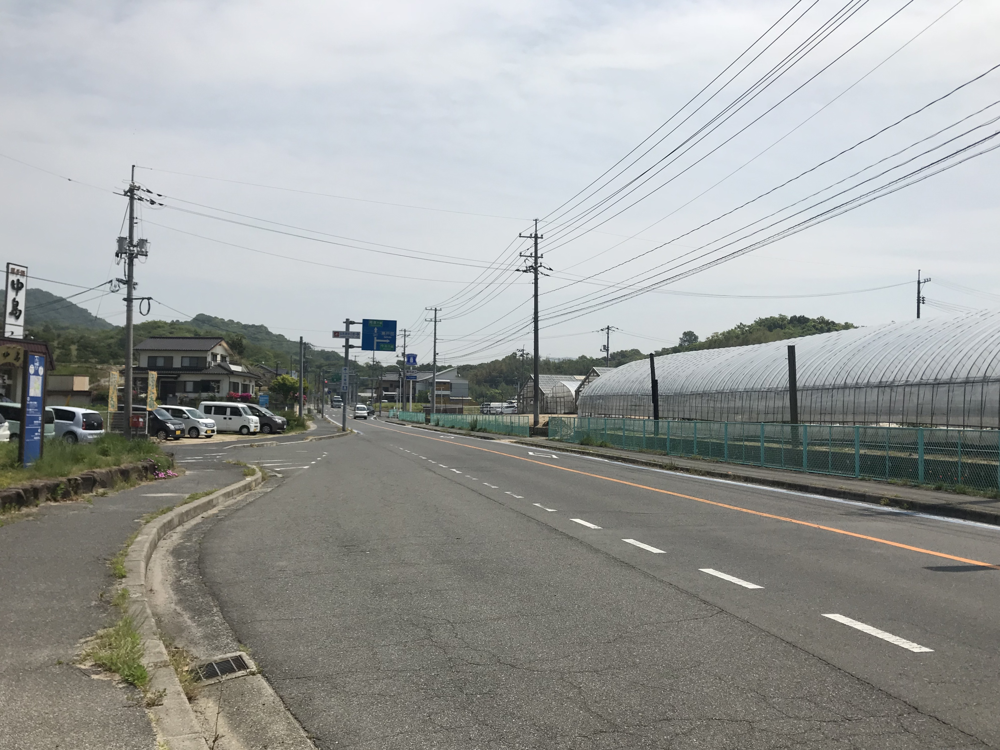 因島の一本松東側の広島県道367号